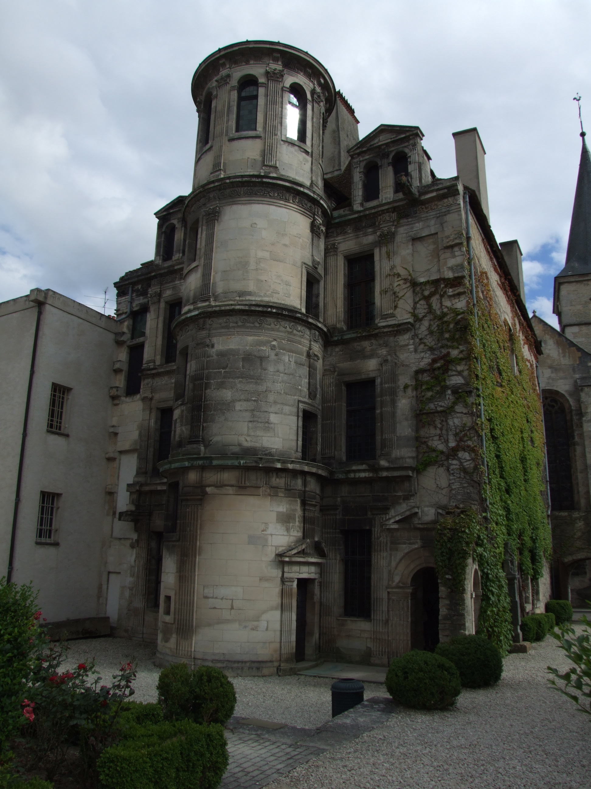 Musée de Châtillon-sur-Seine, Châtillon-sur-Seine, Côte-d'Or, Bourgogne, FRANCE